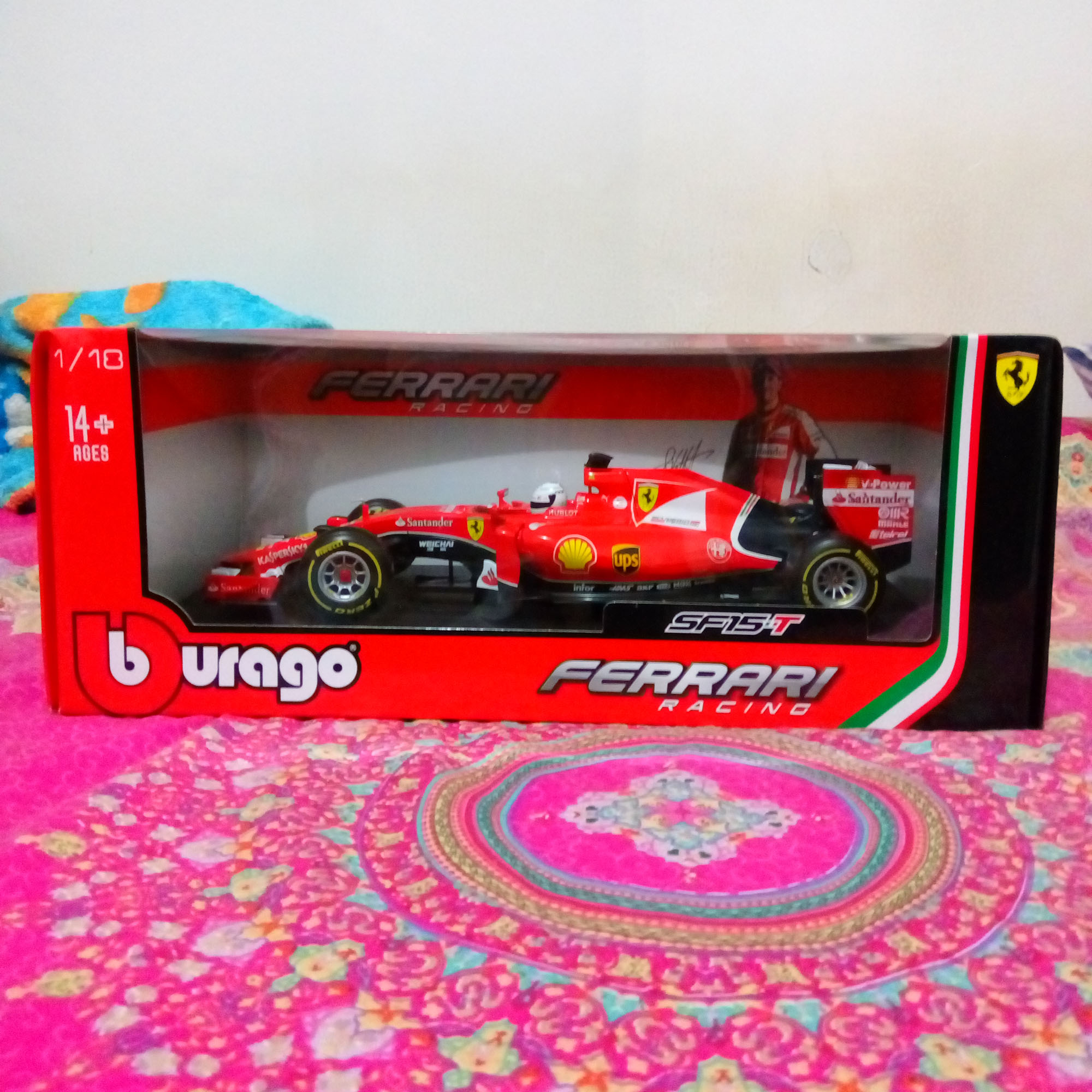 Diecast Ferrari Sebastian Vettel